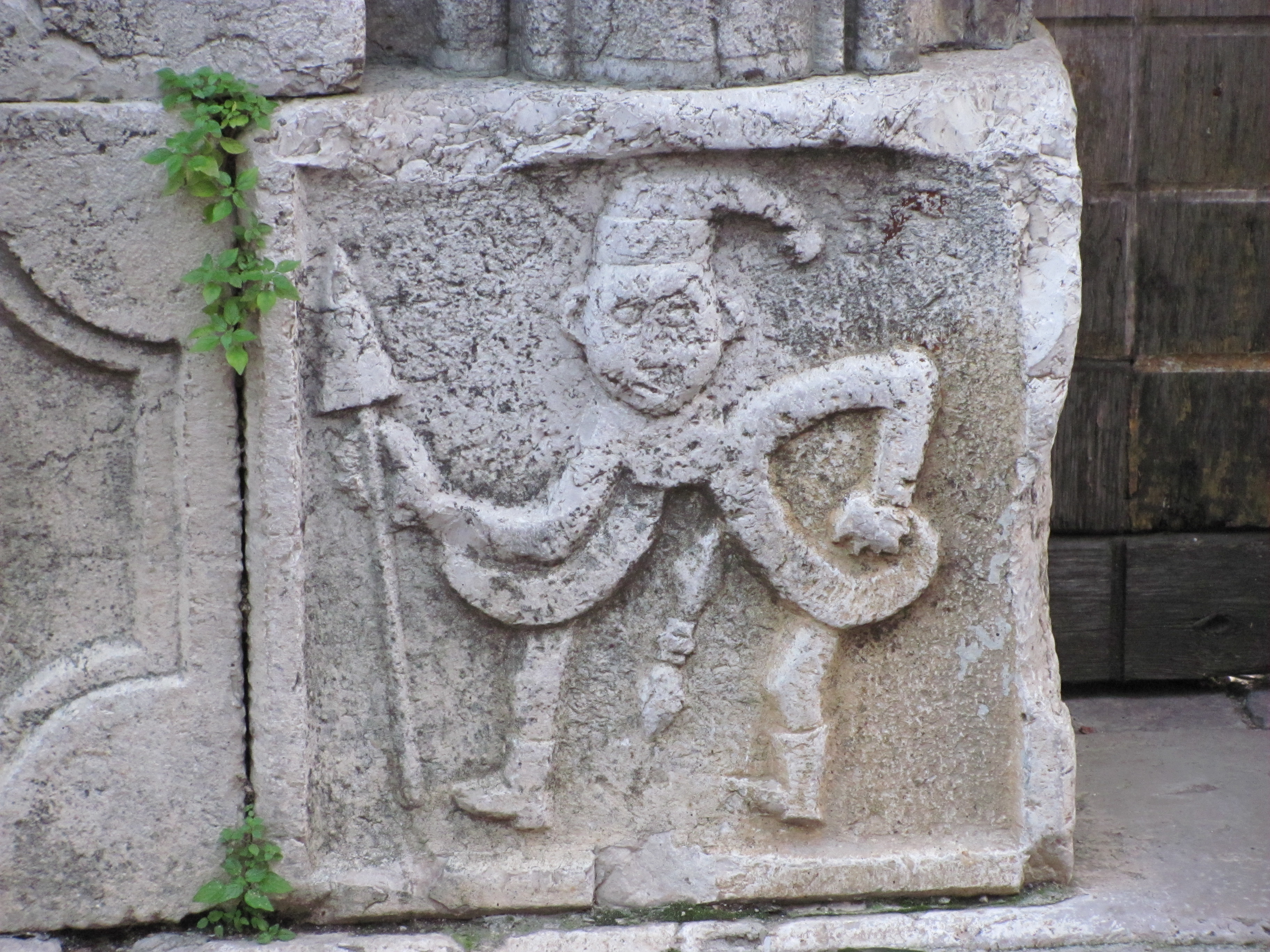 Portale Palazzo Iennaco dettaglio nano dotato SIANO SA (dicembre 2010)